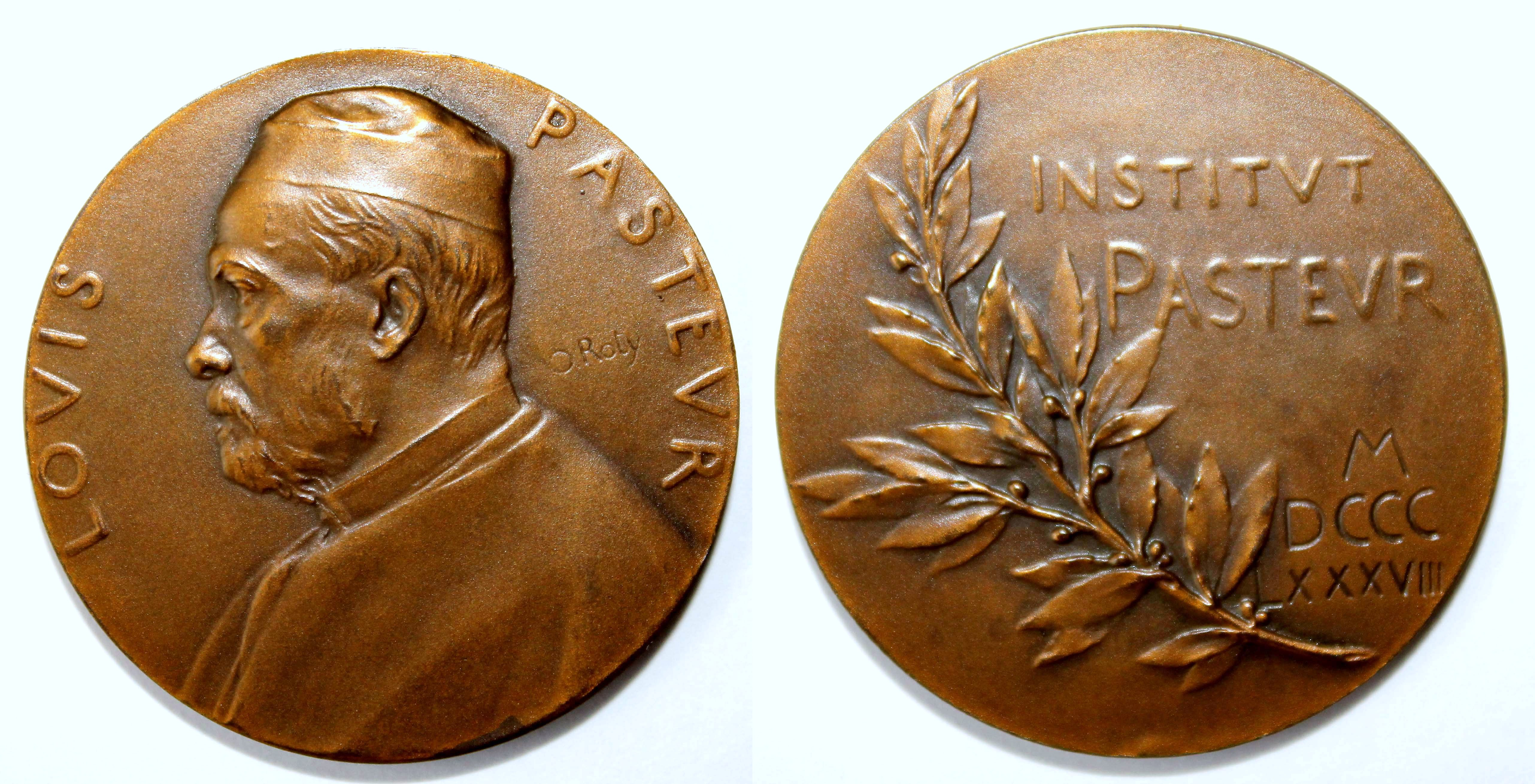 Médaille gravée en 1888 par Oscar Roty. Des exemplaires en bronze et en argent frappés par la La Monnaie de Paris seront vendus pour financer la construction de l' Institut Pasteur.